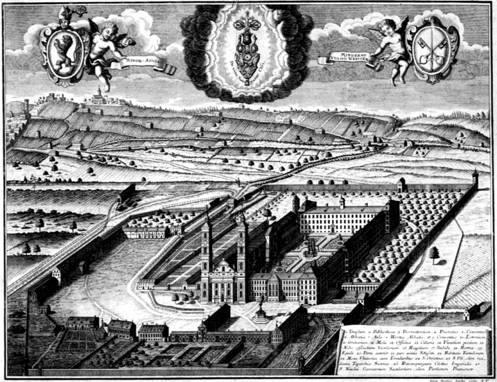 Kloster Weißenau, engraving, 1734